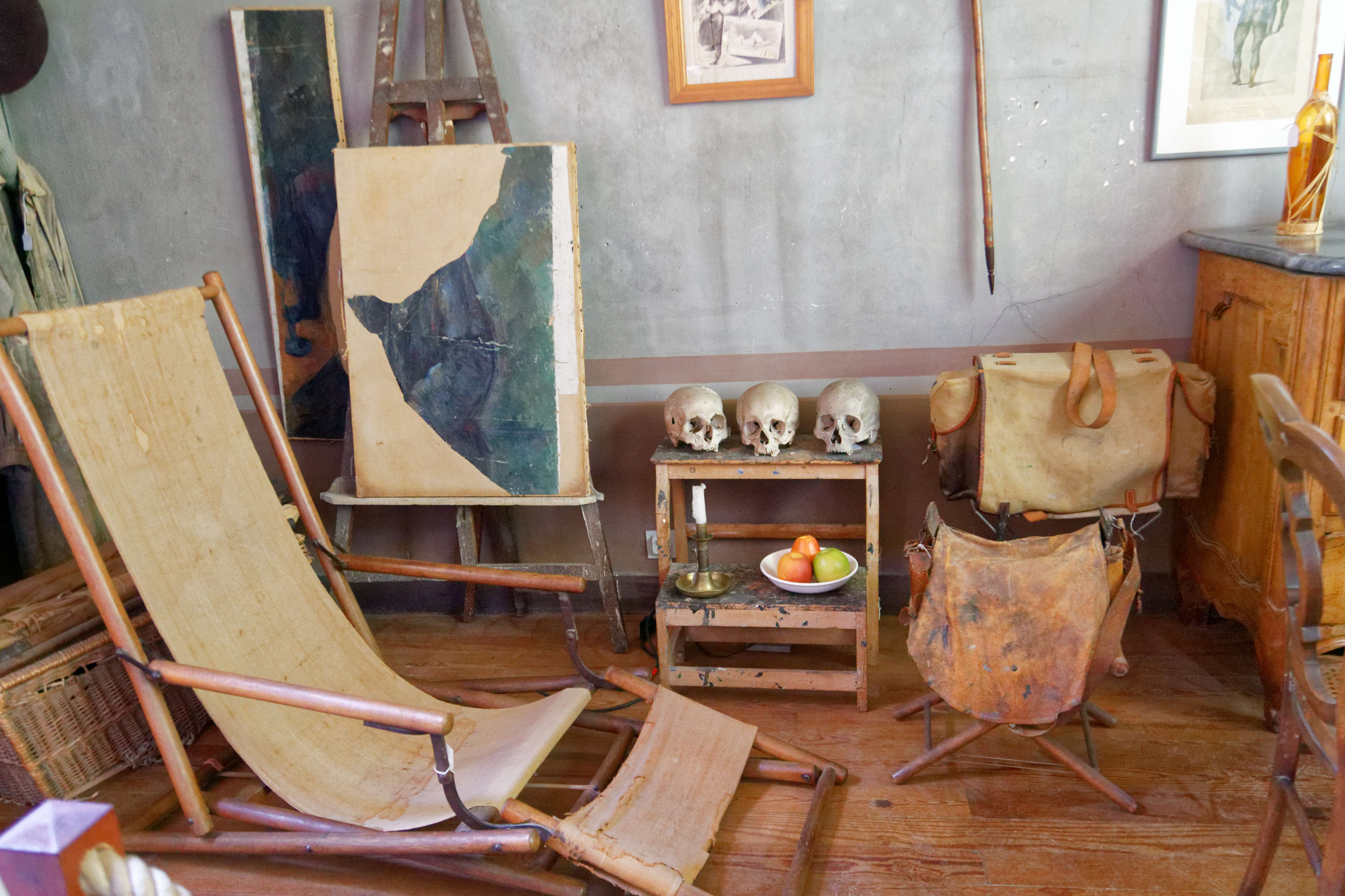 Atelier Cézanne in Aix-en-Provence